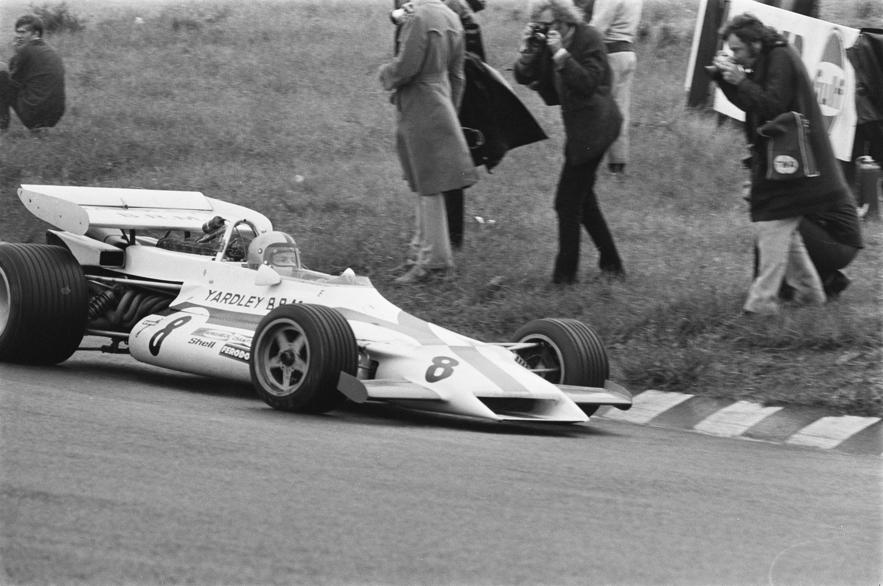 Collectie / Archief : Fotocollectie Anefo Reportage / Serie : Grote Prijs van Nederland Formule I wagen, Zandvoort Beschrijving : Pedro Rodriguez Datum : 20 juni 1971 Locatie : Noord-Holland, Zandvoort Trefwoorden : autosport, circuits, raceauto's, races, wedstrijden Persoonsnaam : Rodriguez, Pedro Fotograaf : Fotograaf Onbekend / Anefo, [onbekend] Auteursrechthebbende : Nationaal Archief Materiaalsoort : Negatief (zwart/wit) Nummer archiefinventaris : bekijk toegang 2.24.01.05 Bestanddeelnummer : 924-6667